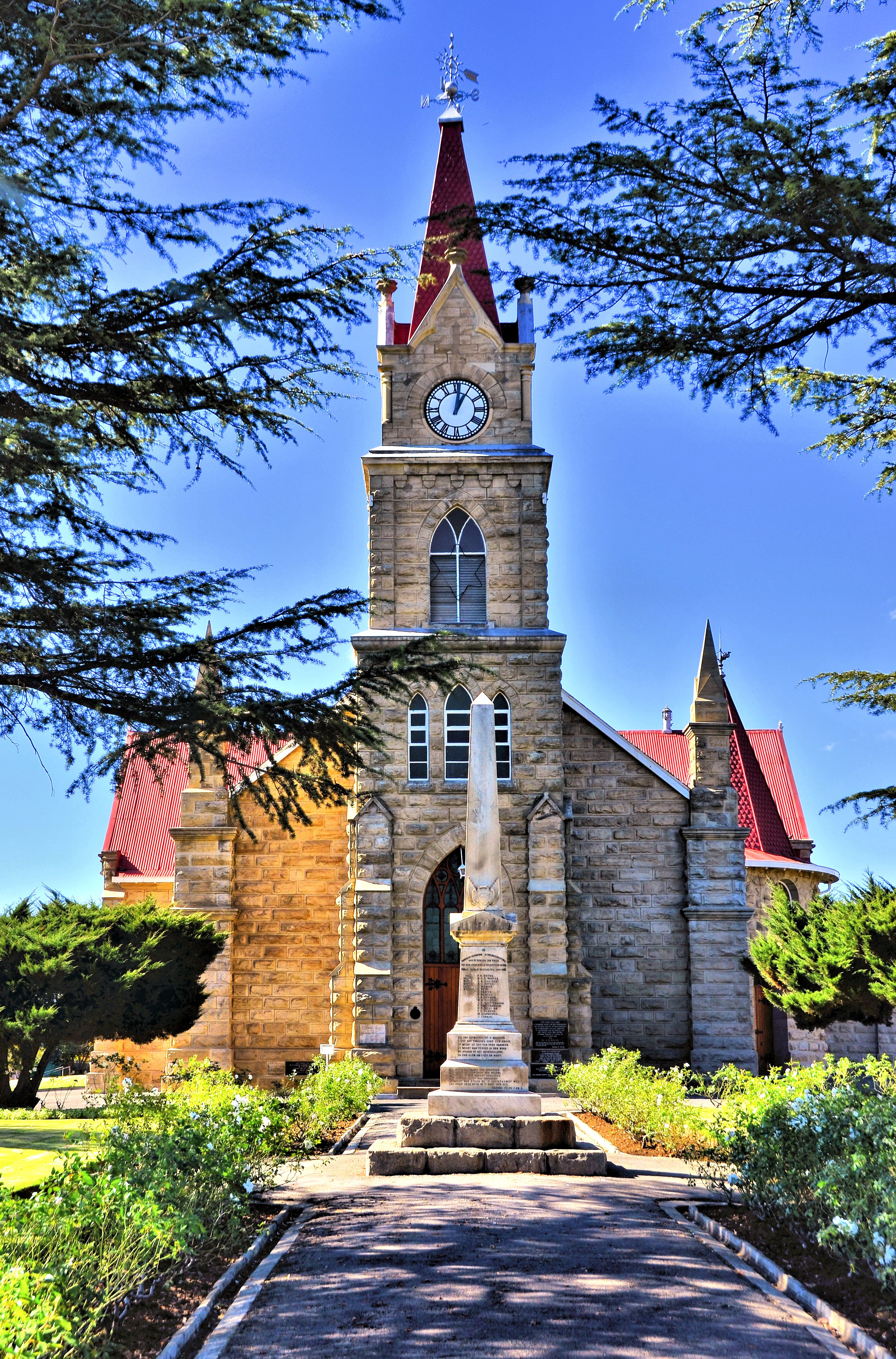 Nederduitse Gereformeerde Kerk - Vrede